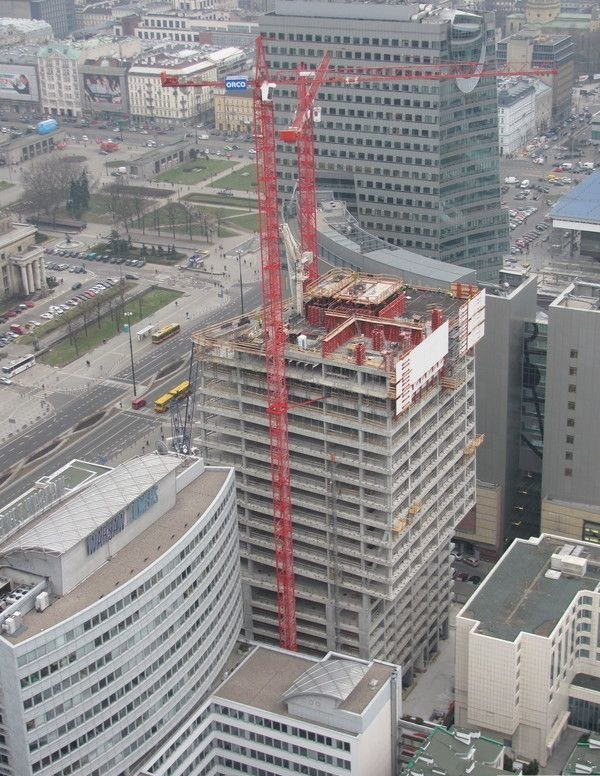 Zdjęcie zostało wykonane w kwietniu 2011 roku po wznowieniu prac przy budowie budynku.